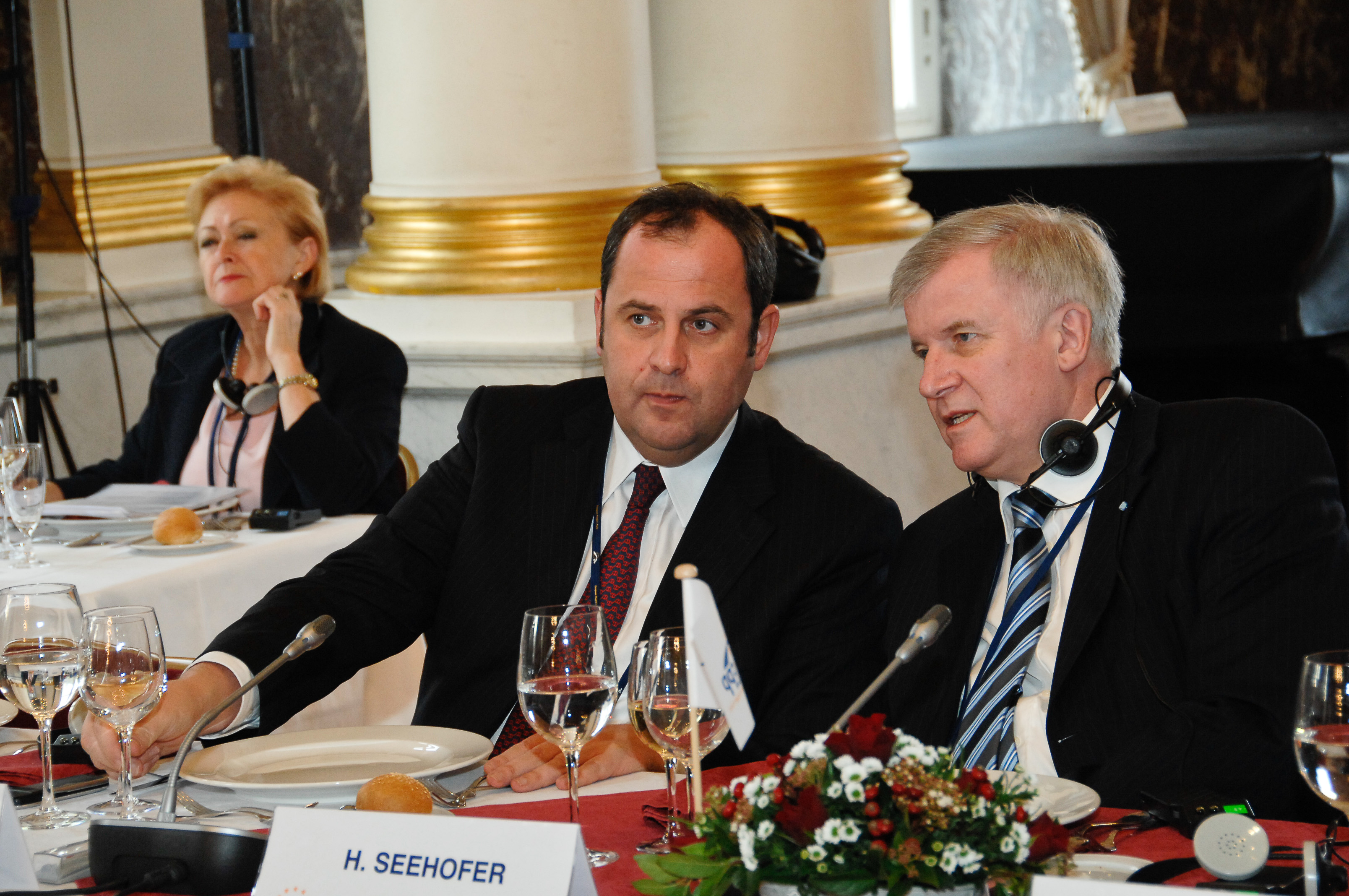 EPP Summit 11 December 2008